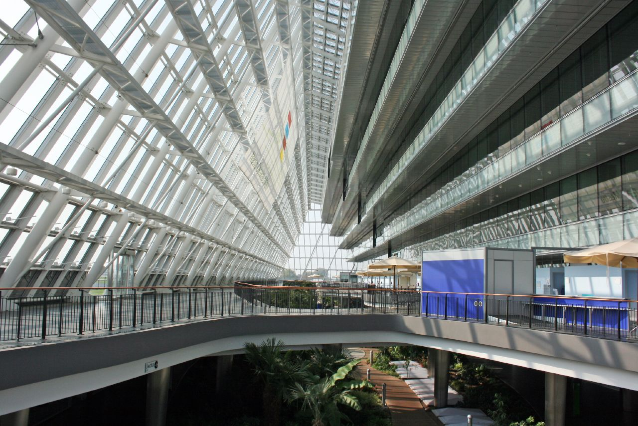 Nuovo Ospedale di Mestre (Altieri + Ambasz)